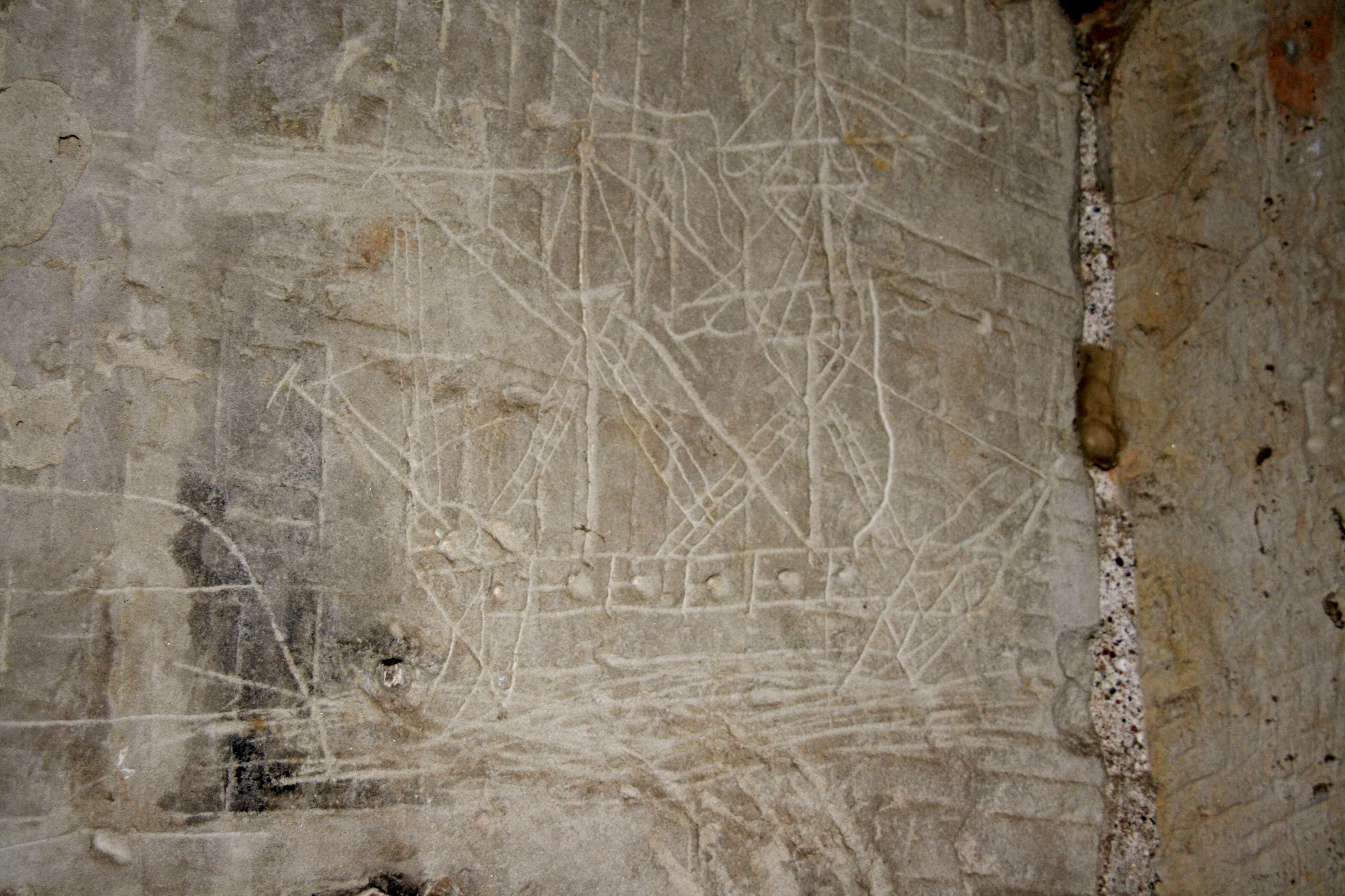 Cachot de la tour n°13. Un prisonnier anglais a gravé un dessin de son bateau sur un mur, pendant les guerres napoléoniennes.